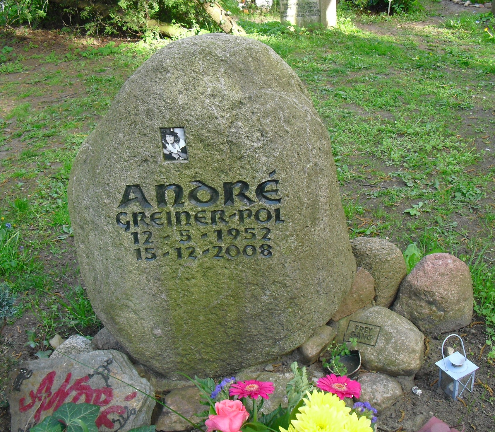 Grabstein für den Musiker André Greiner-Pol (Freygang) auf dem Neuen Friedhof St. Marien-St. Nikolai in Berlin-Prenzlauer Berg